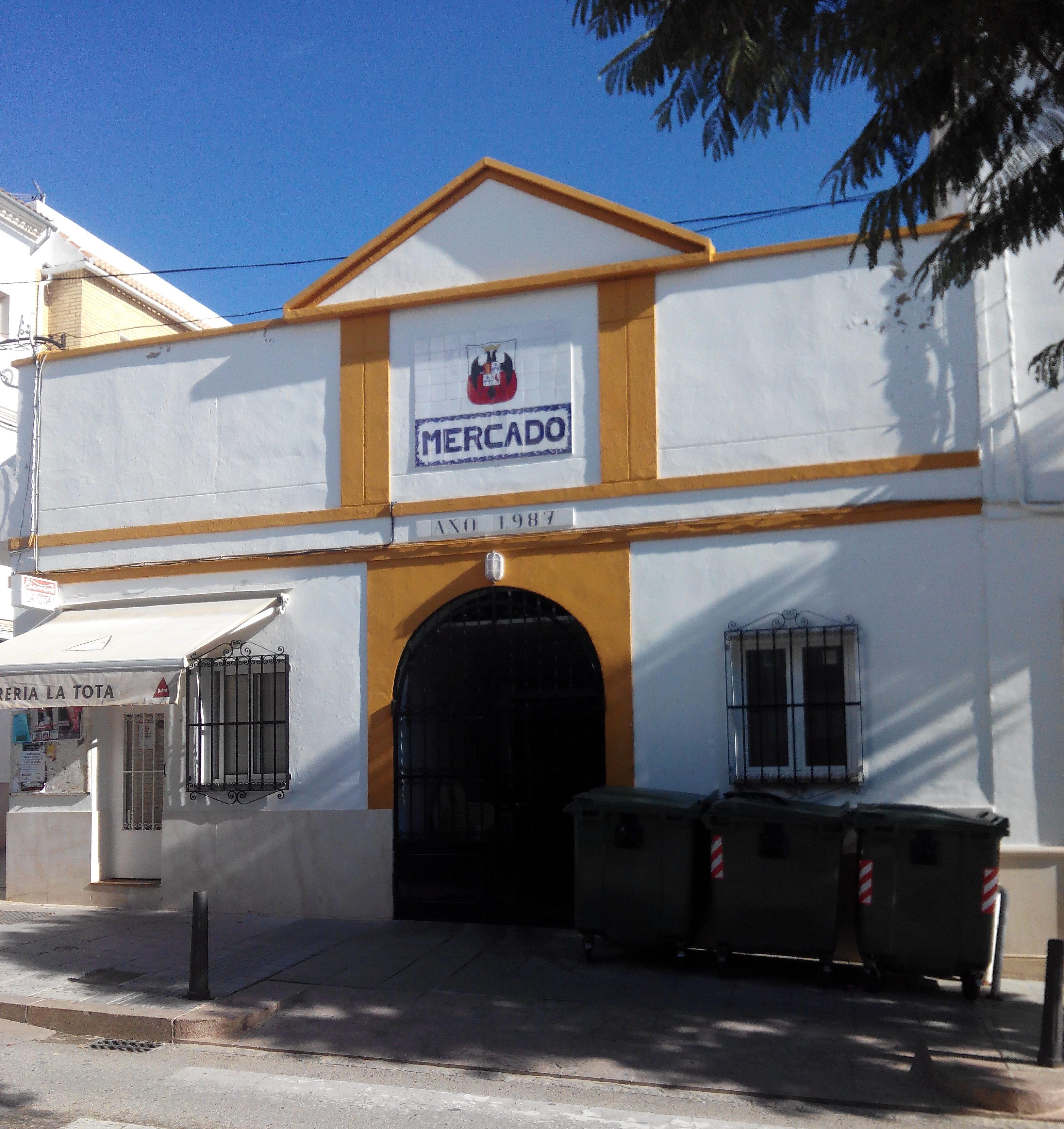 Mercado de Abastos de Montalbán de Córdoba (España).